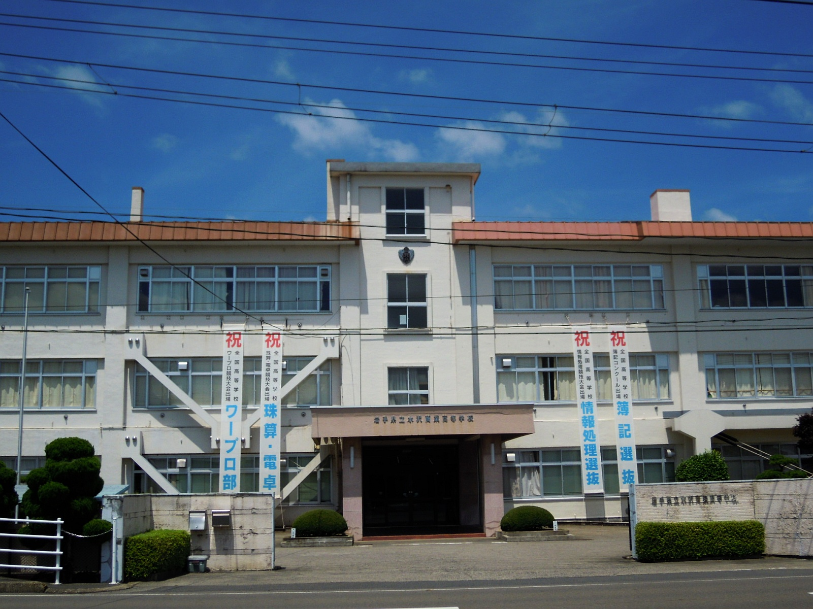 岩手県奥州市にある岩手県立水沢商業高等学校